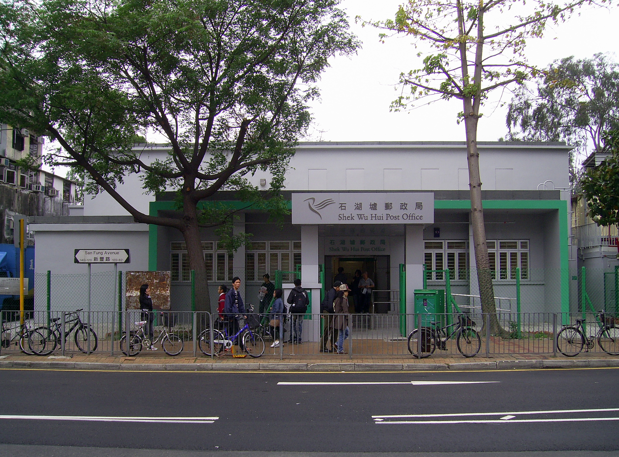 中文（香港）: 石湖墟郵政局